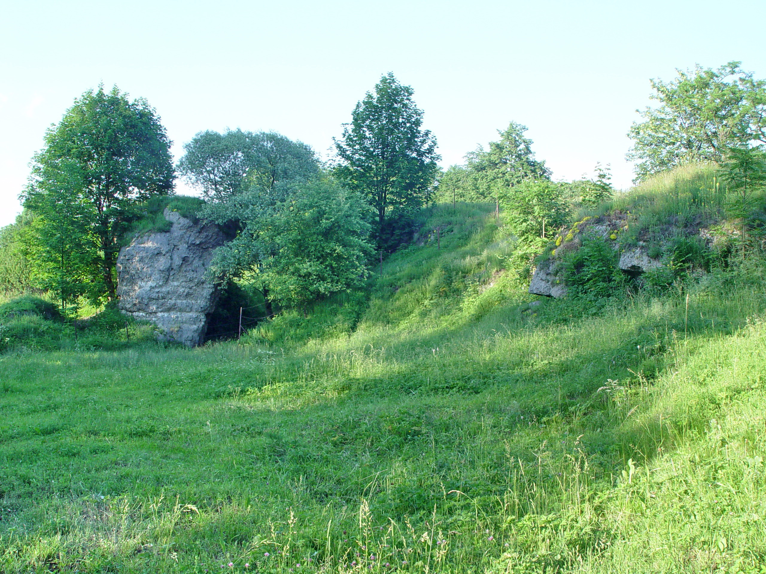 Skorocice, Rezerwat skalno-stepowy "Skorocice", wnętrze zapadliska krasowego.